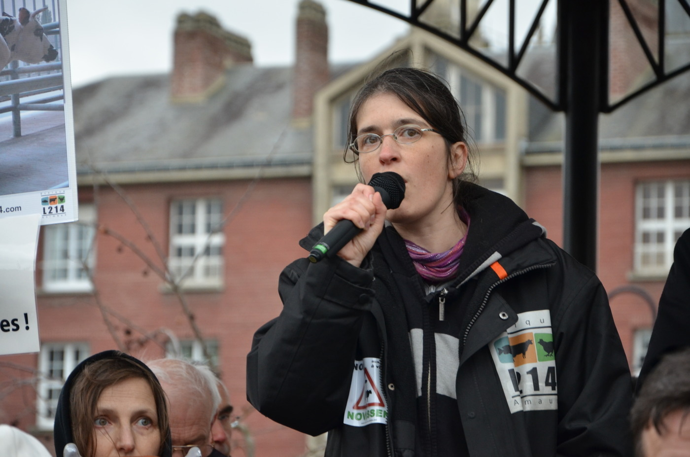 Brigitte Gothière lors de la manifestation contre la ferme des 1000-vaches à Abbeville, le 18 février 2012